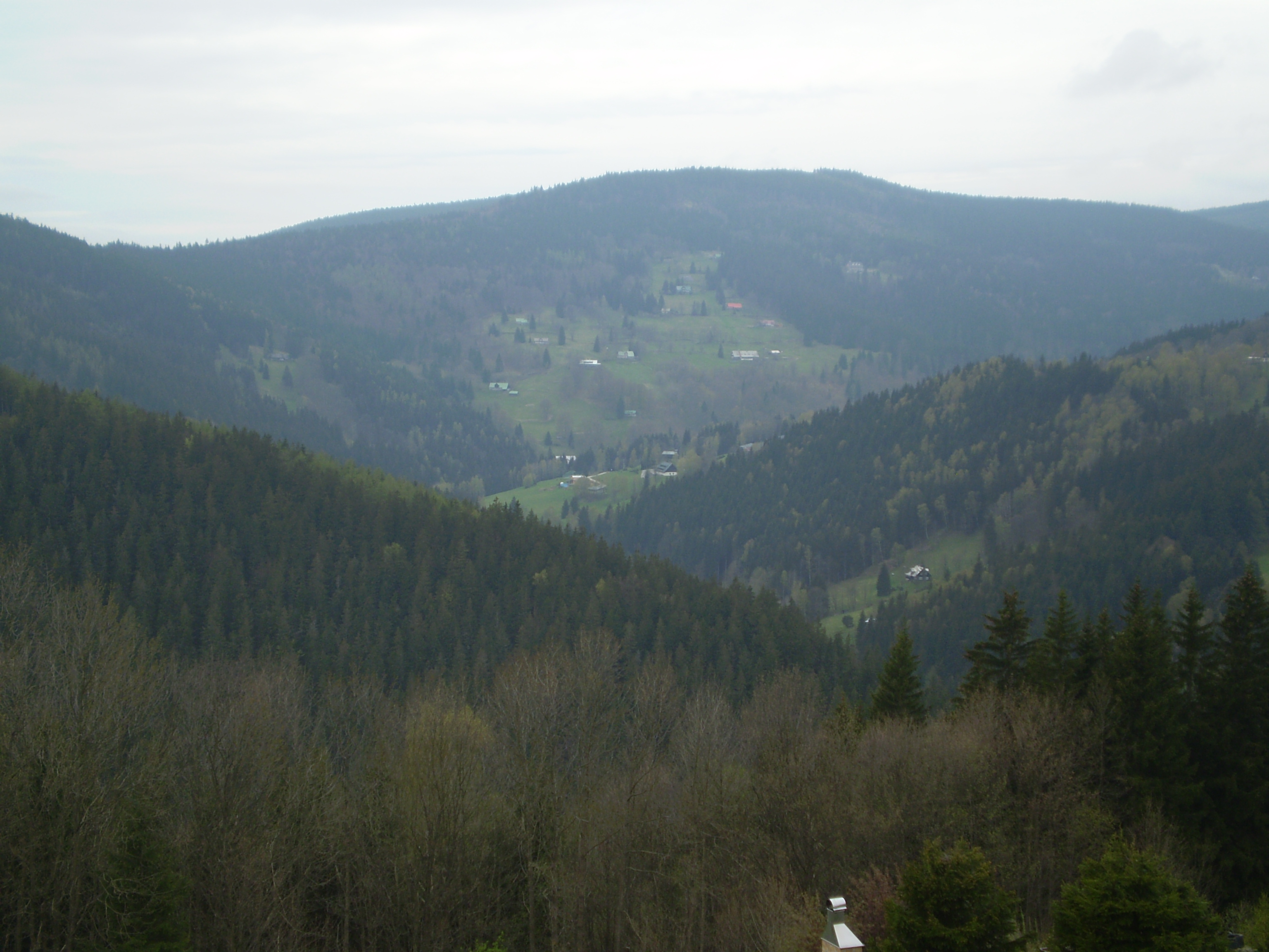 Šeřín, Krkonoše